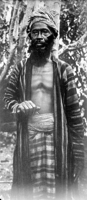 Repronegatief. Hoofd van Wandji, Tukangbesi